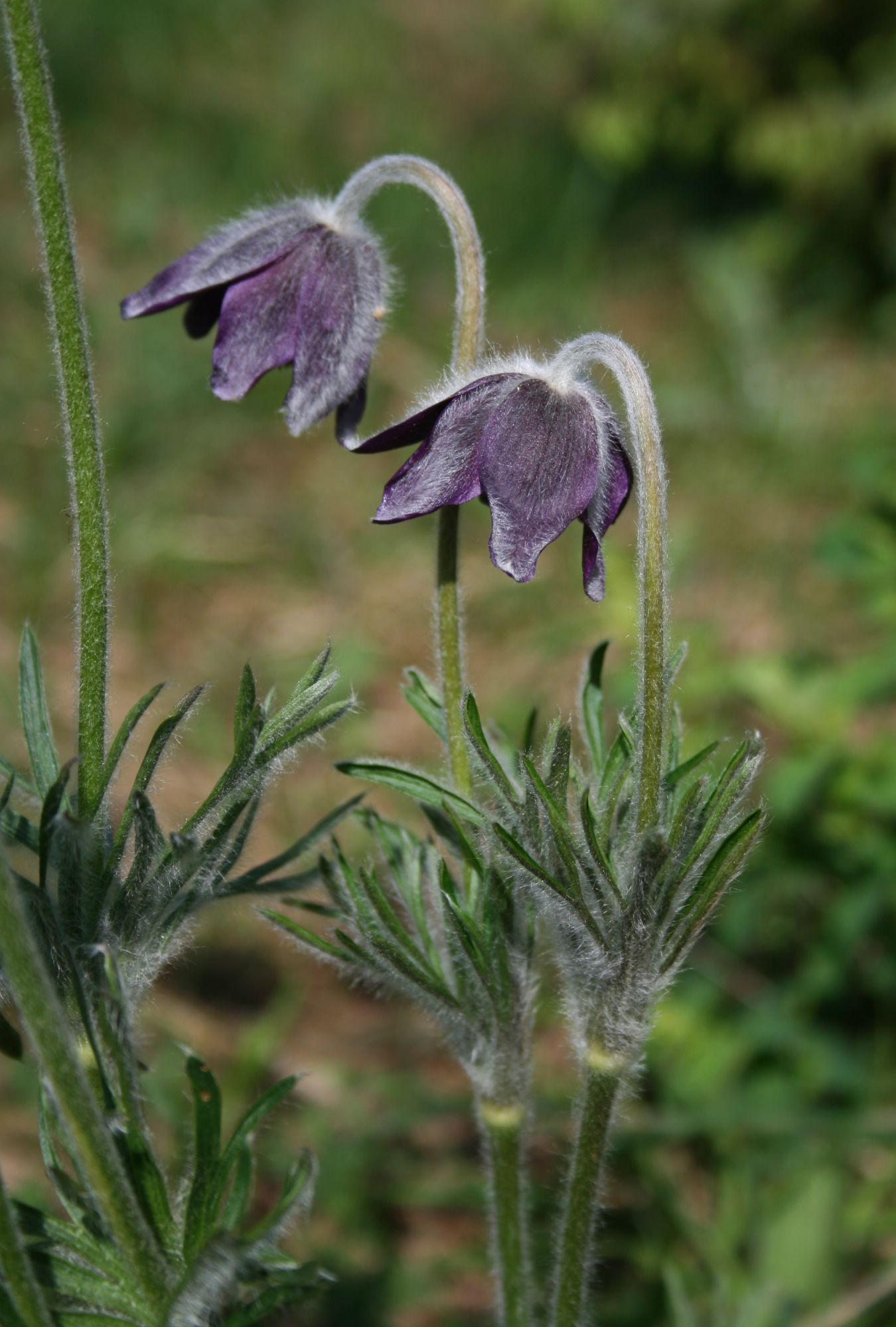 Berg-Kuhschelle (Pulsatilla montana), Hahnenfußgewächse (Ranunculaceae) - Italien/Italia/Italy: Friuli-Venezia Giulia, Prov. Trieste, Monte Cocusso